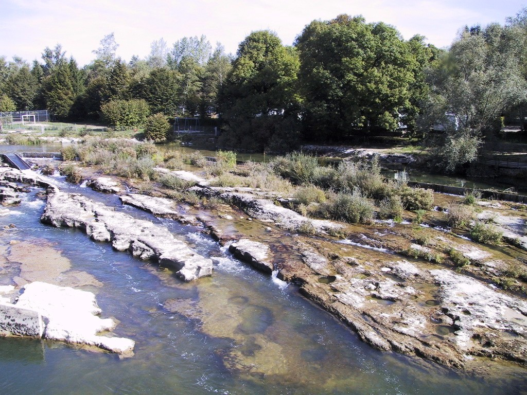 Den Ain um Pont de Poitte.